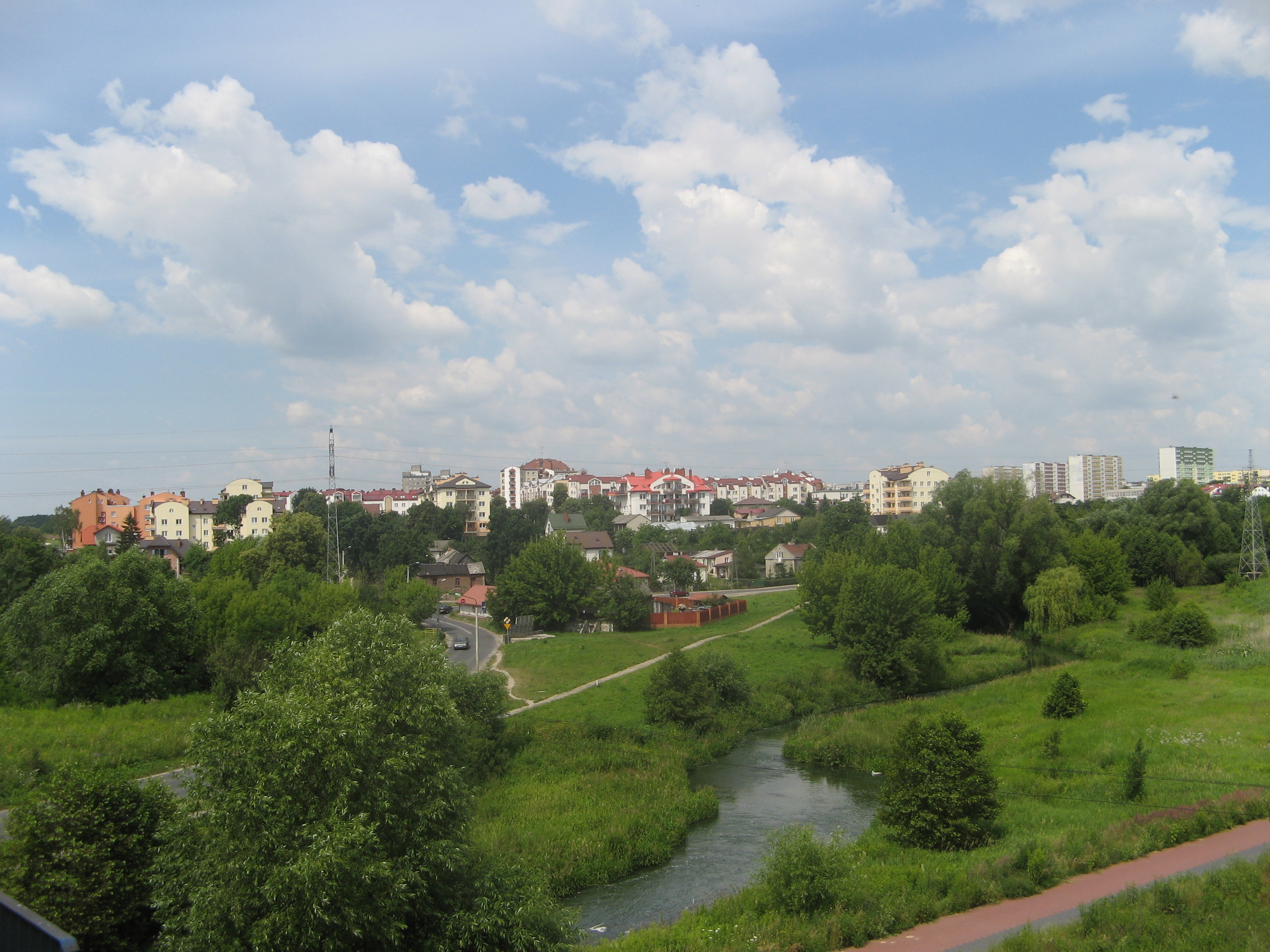 Lublin - dzielnica Czuby